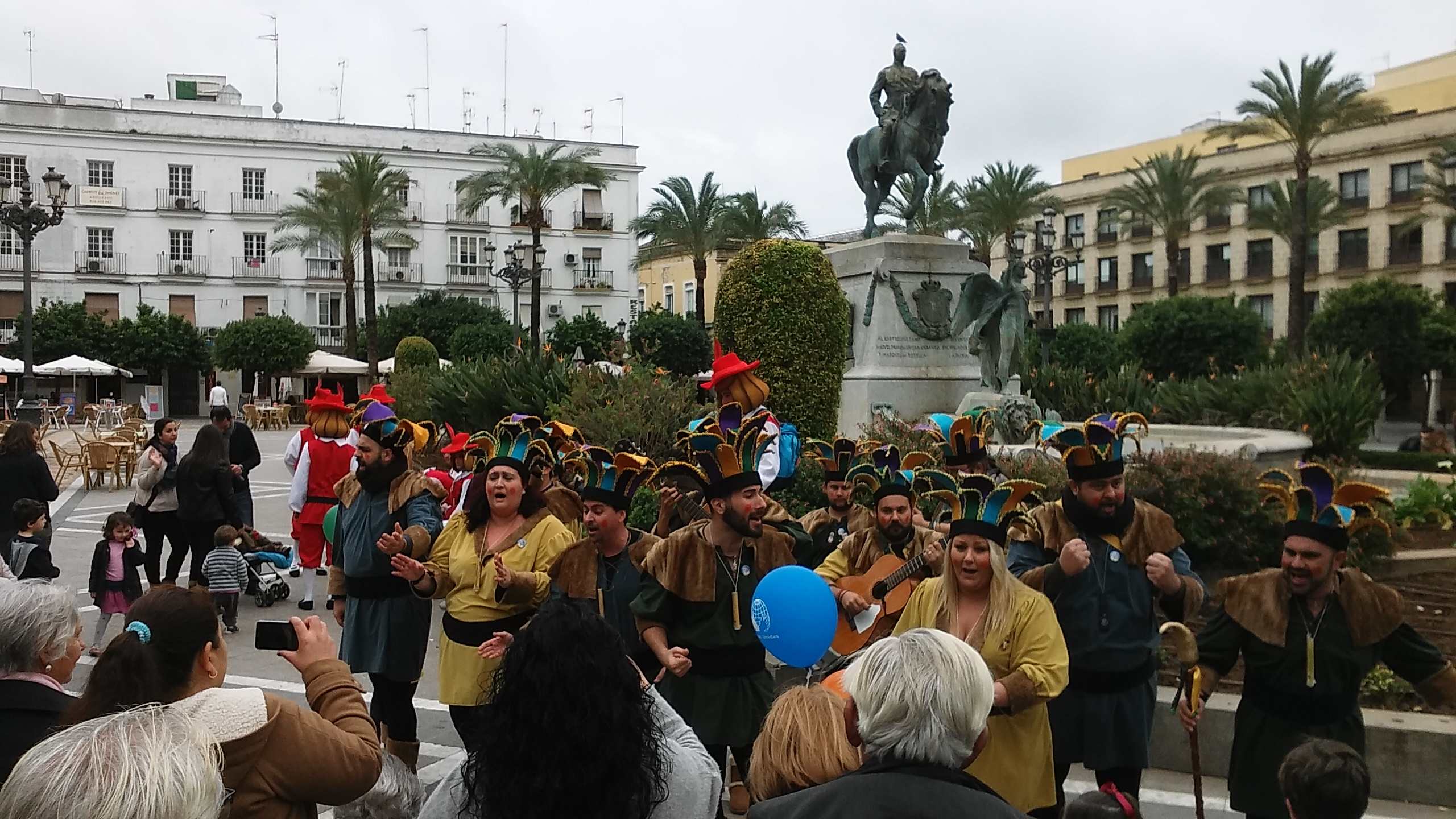 Carnaval de Jerez de la Frontera (Andalucía, España) 2016